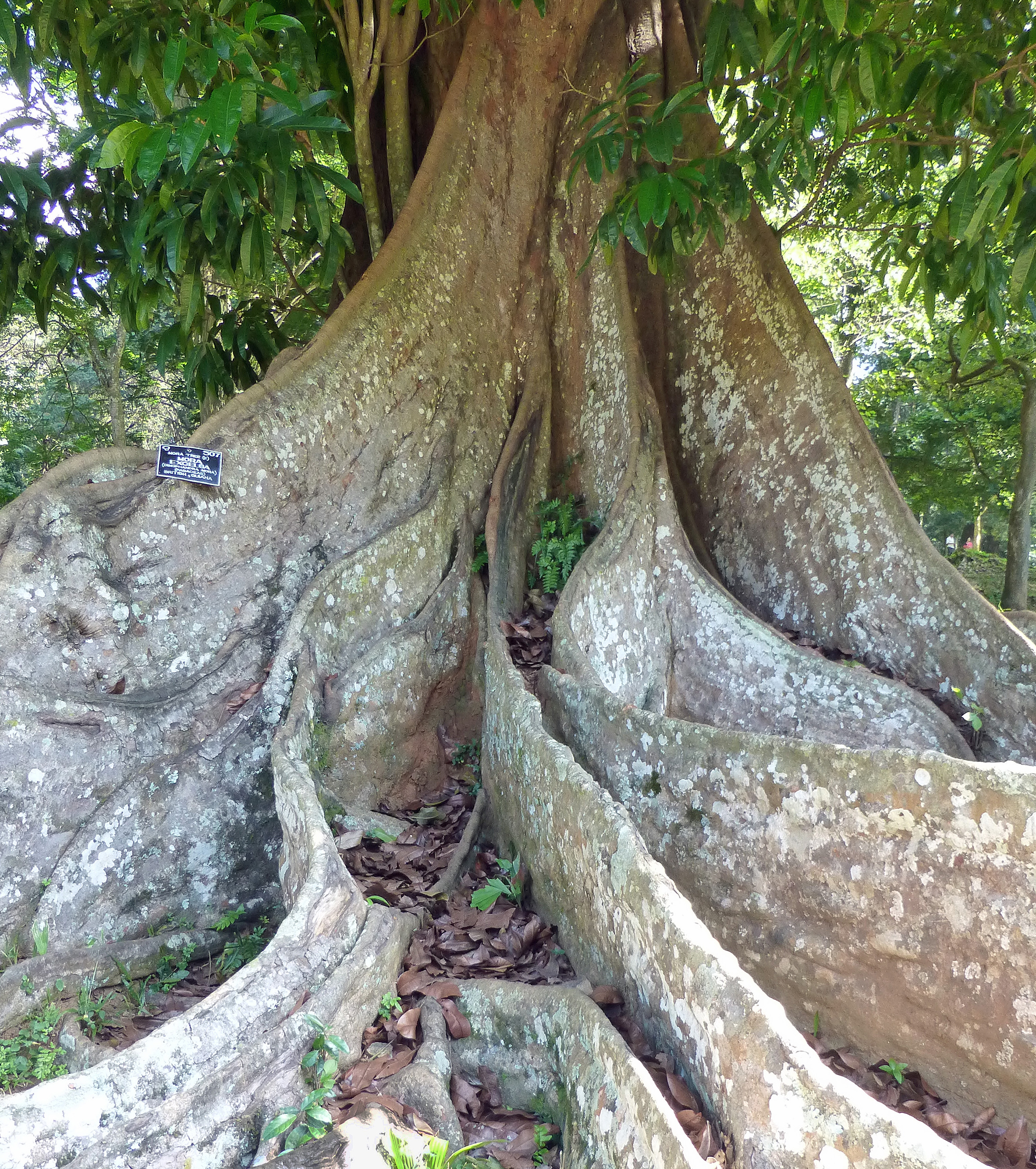 Mora tree, Mora excelsa (Dimorphandra mora), au Jardin botanique de Kandy (Sri Lanka)